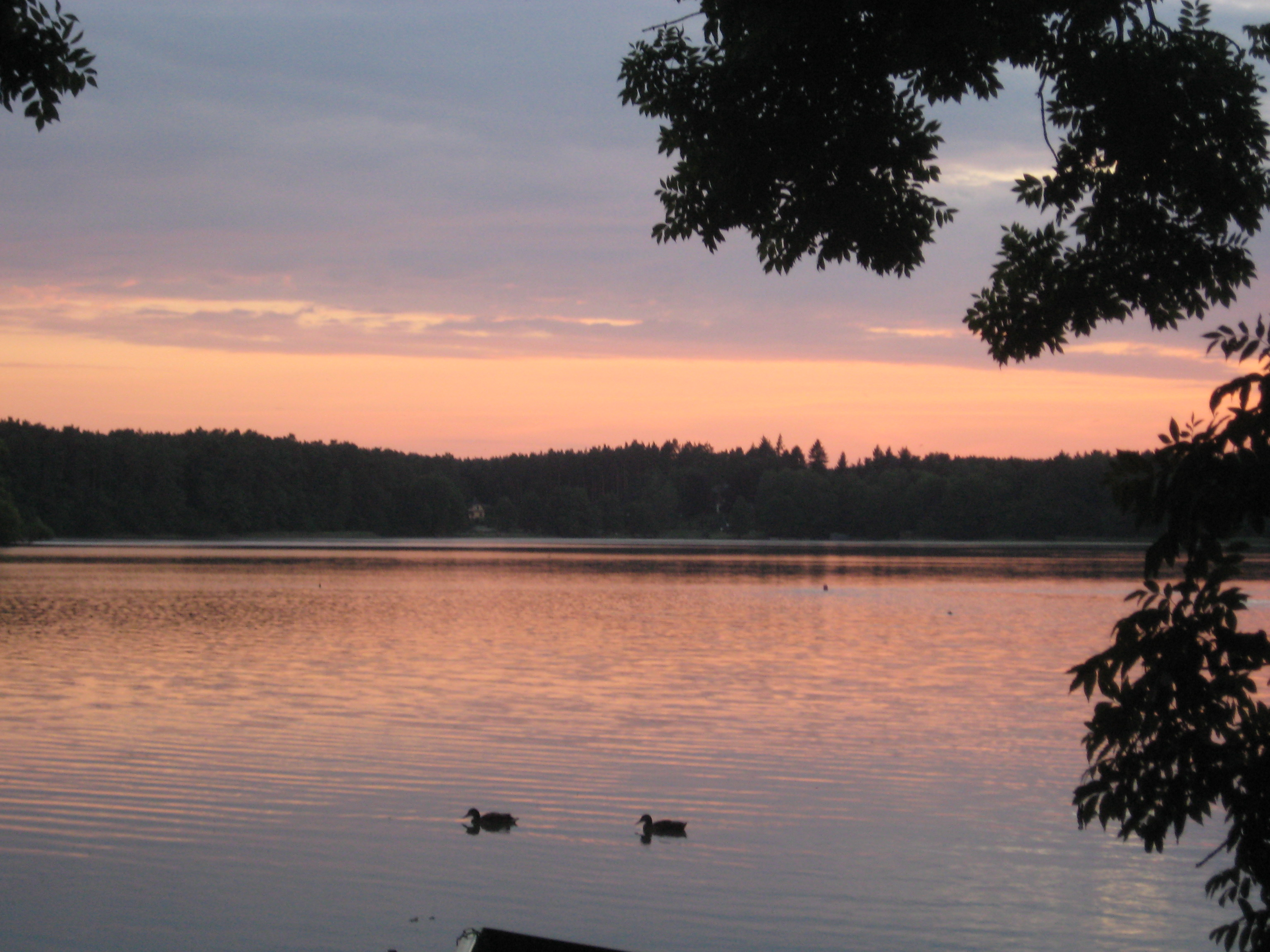 Der Wurlsee bei Lychen (Landkreis Uckermark, Brandenburg).